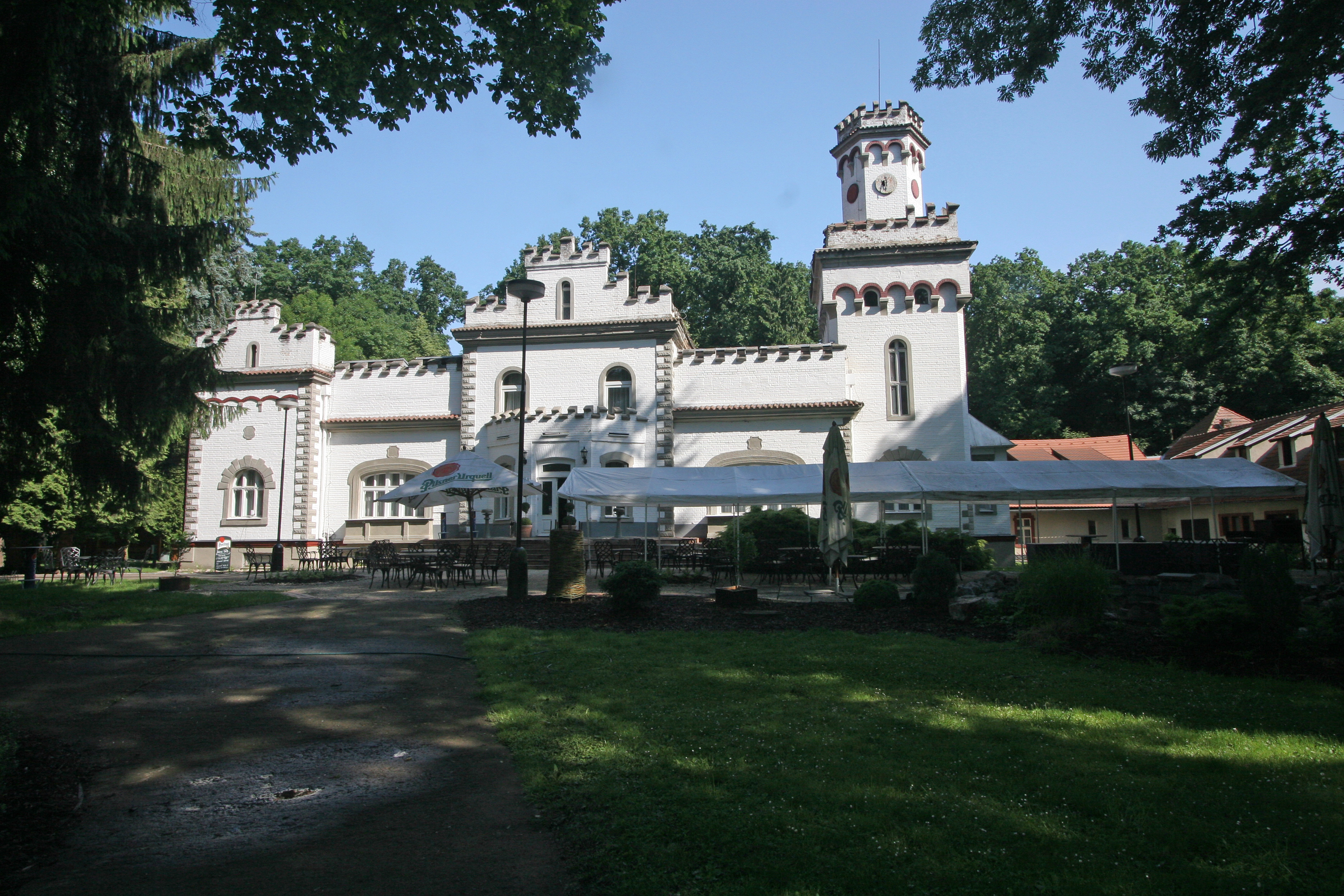 Staré Čívice zámeček